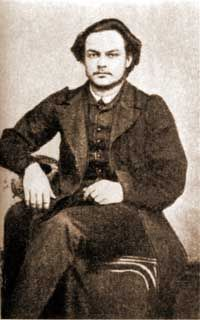 Беларуская (тарашкевіца): Фота Тытуса Далеўскага. 1862